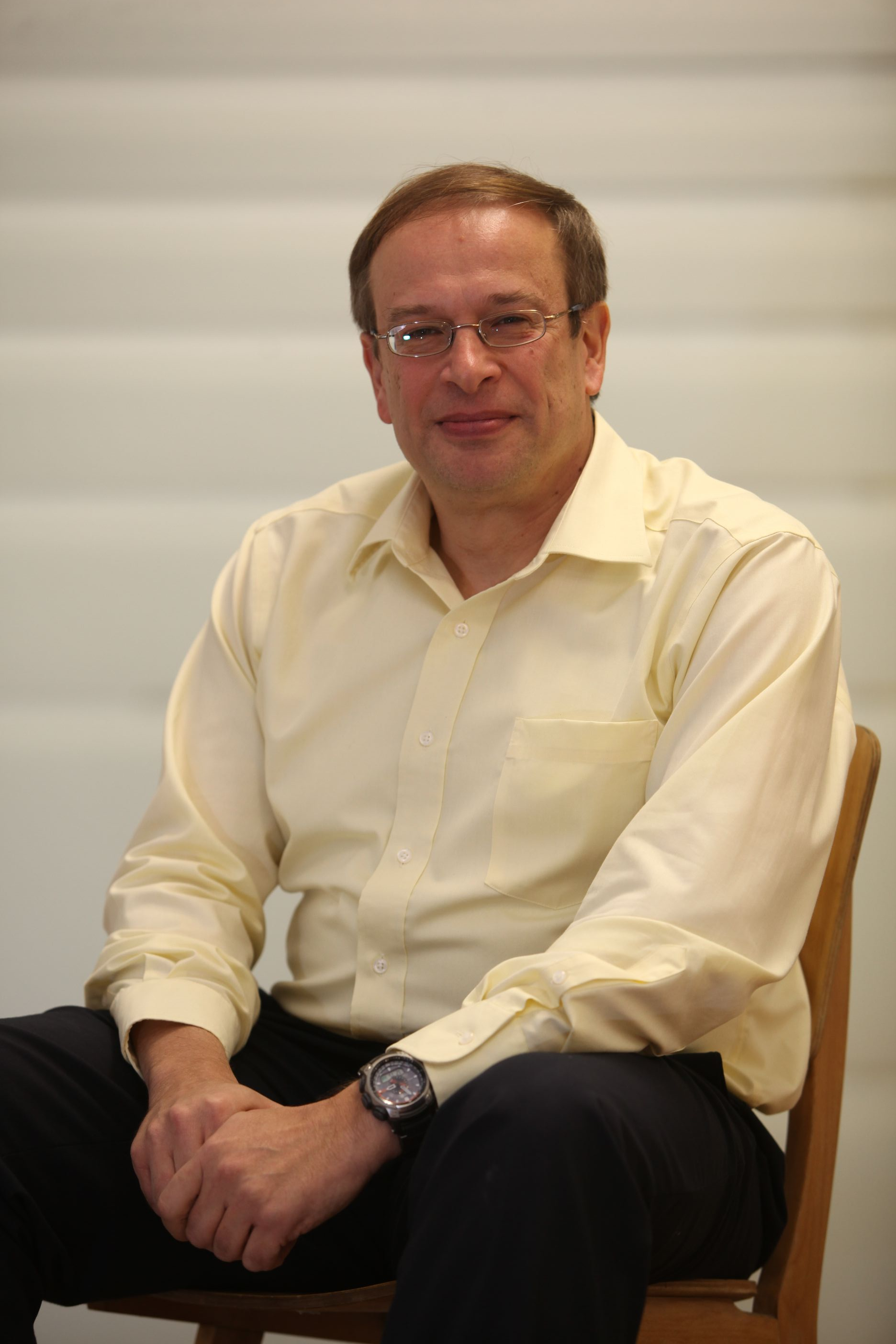 פרופסור רונן פלדמן